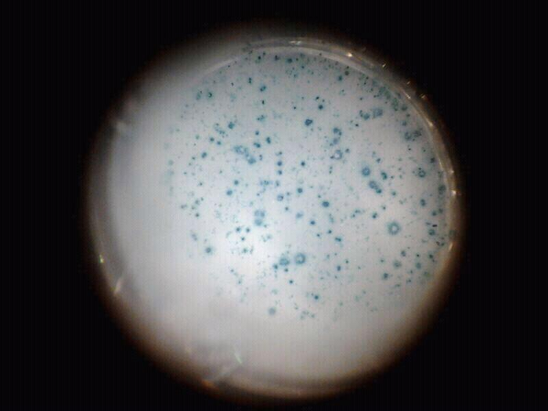 Observacio d'un pou d'una placa d'ELISPOT. Experiment realitzat per alumnes de veterinària de la UAB; gener 2013.